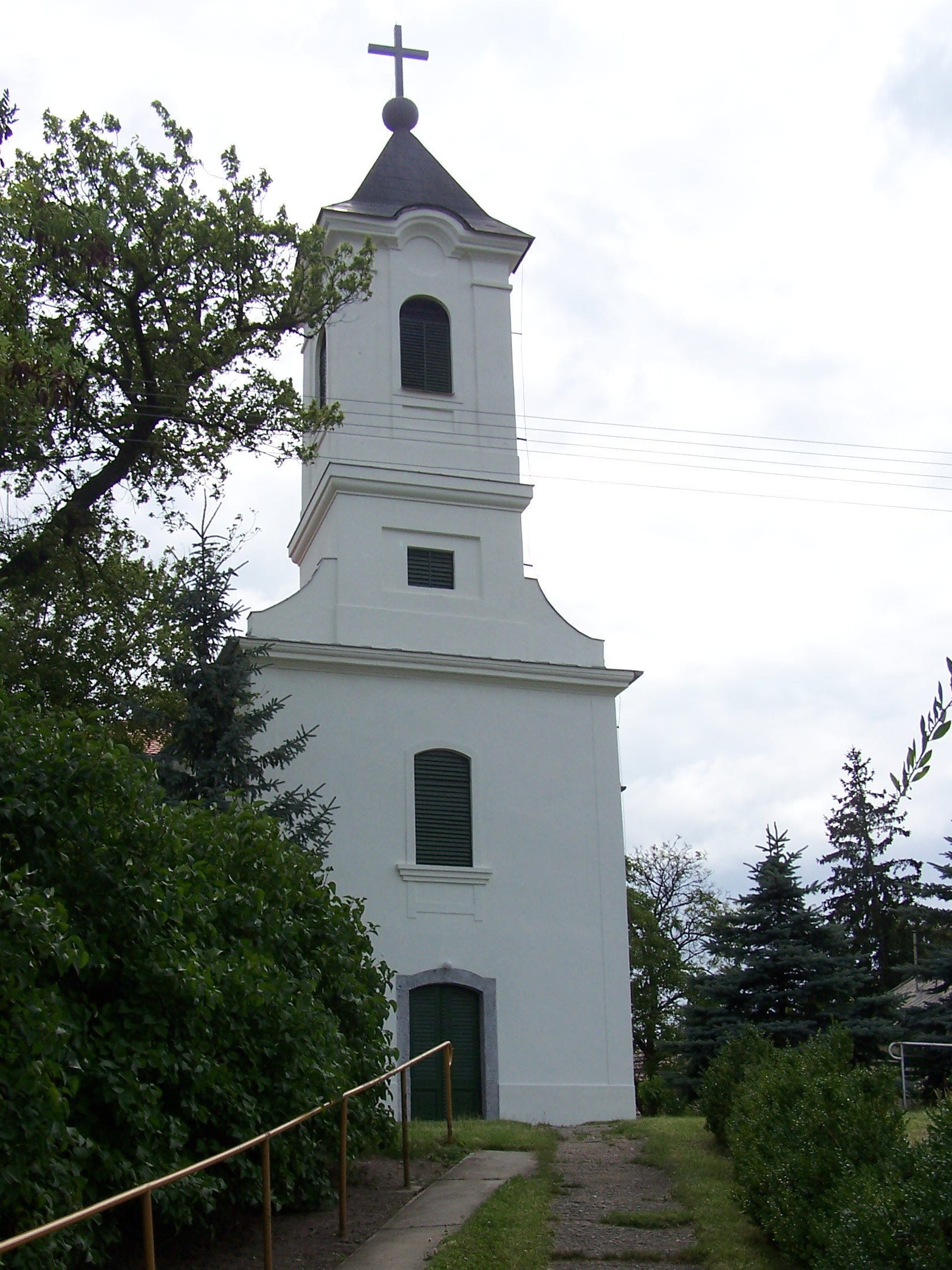 R. k. templom (Havas Boldogasszony) (Nagykökényes, Hősök tere)